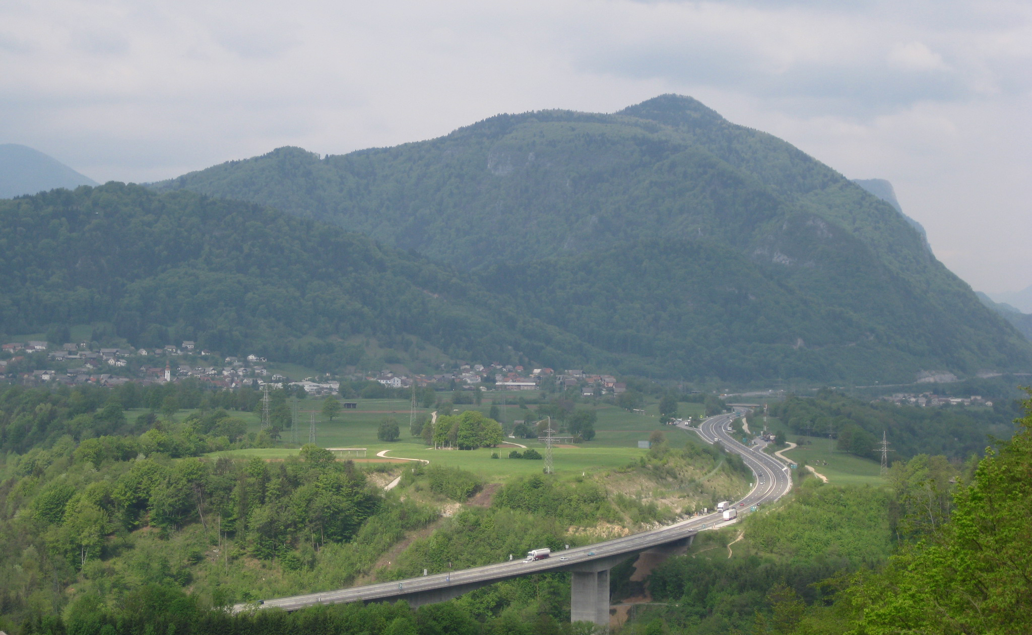 Mežakla, plateau in Slovenia (on left: Blejska Dobrava; below: Lipce)